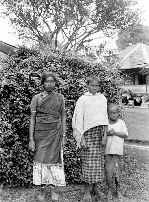 Negatief. Portret van twee Klingalese vrouwen en één kind aan de Sumatraanse oostkust